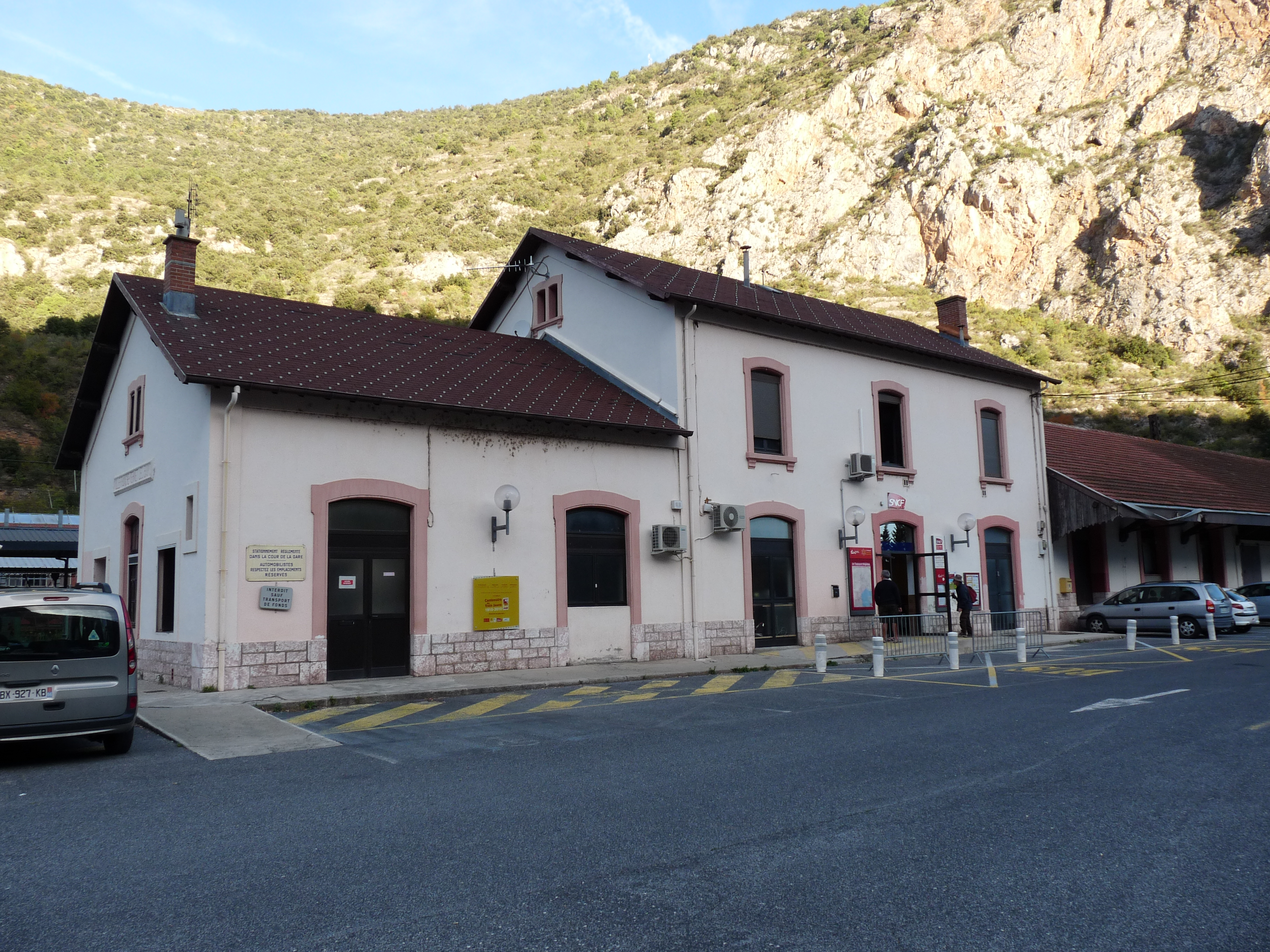 Stationsgebouw van de straatzijde